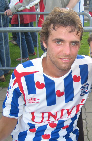 De voetballer Gonzalo García García, in Leek (op de velden van voetbalvereniging Leek-Rodenburg), waar de oefenwedstrijd Heerenveen - Sheffield Wednesday werd gespeeld.